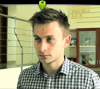 Ion Jardan